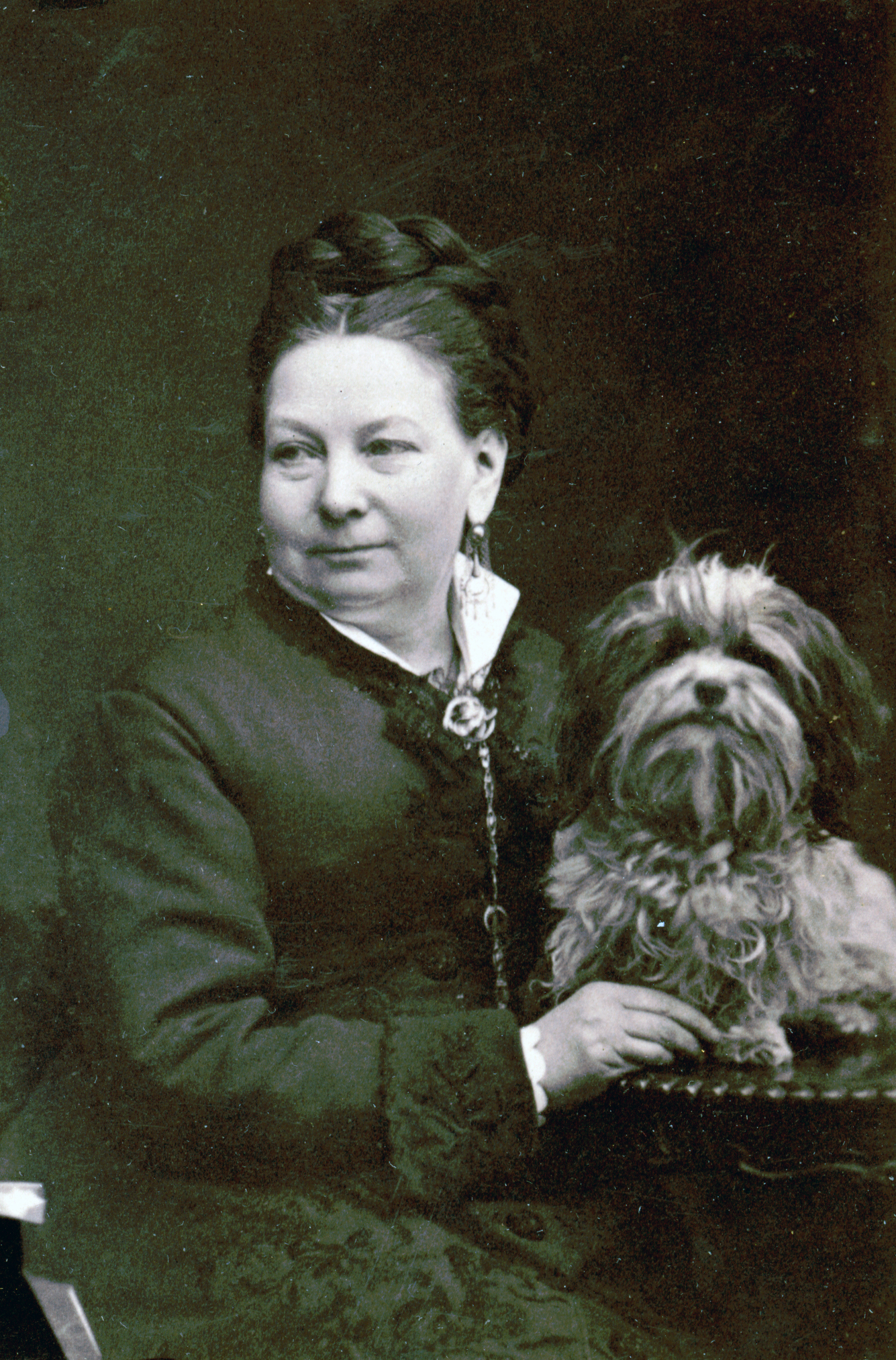 Thérèse Elfforss, teaterdirektör, odaterat porträtt